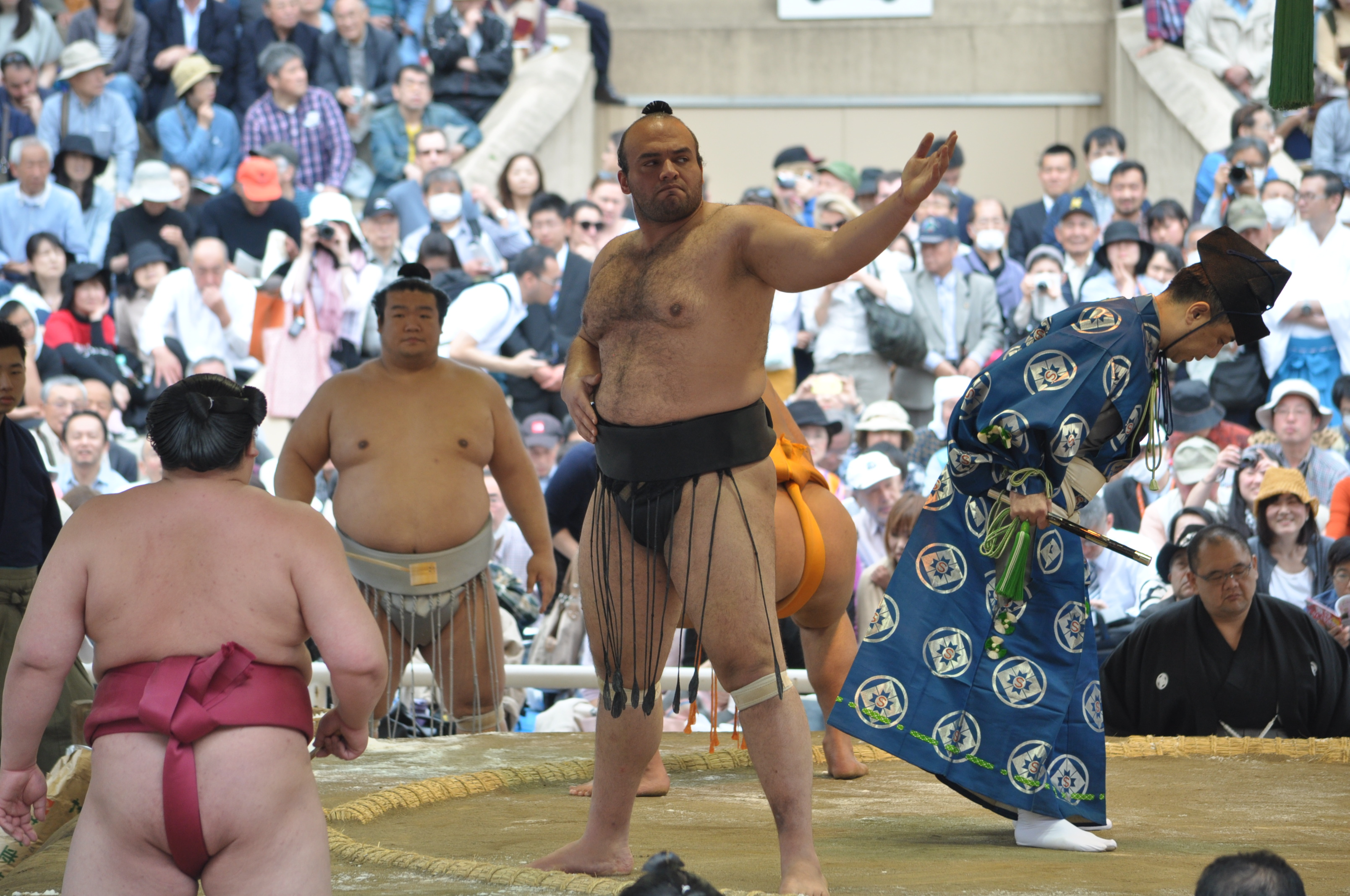 大砂嵐 金崇郎